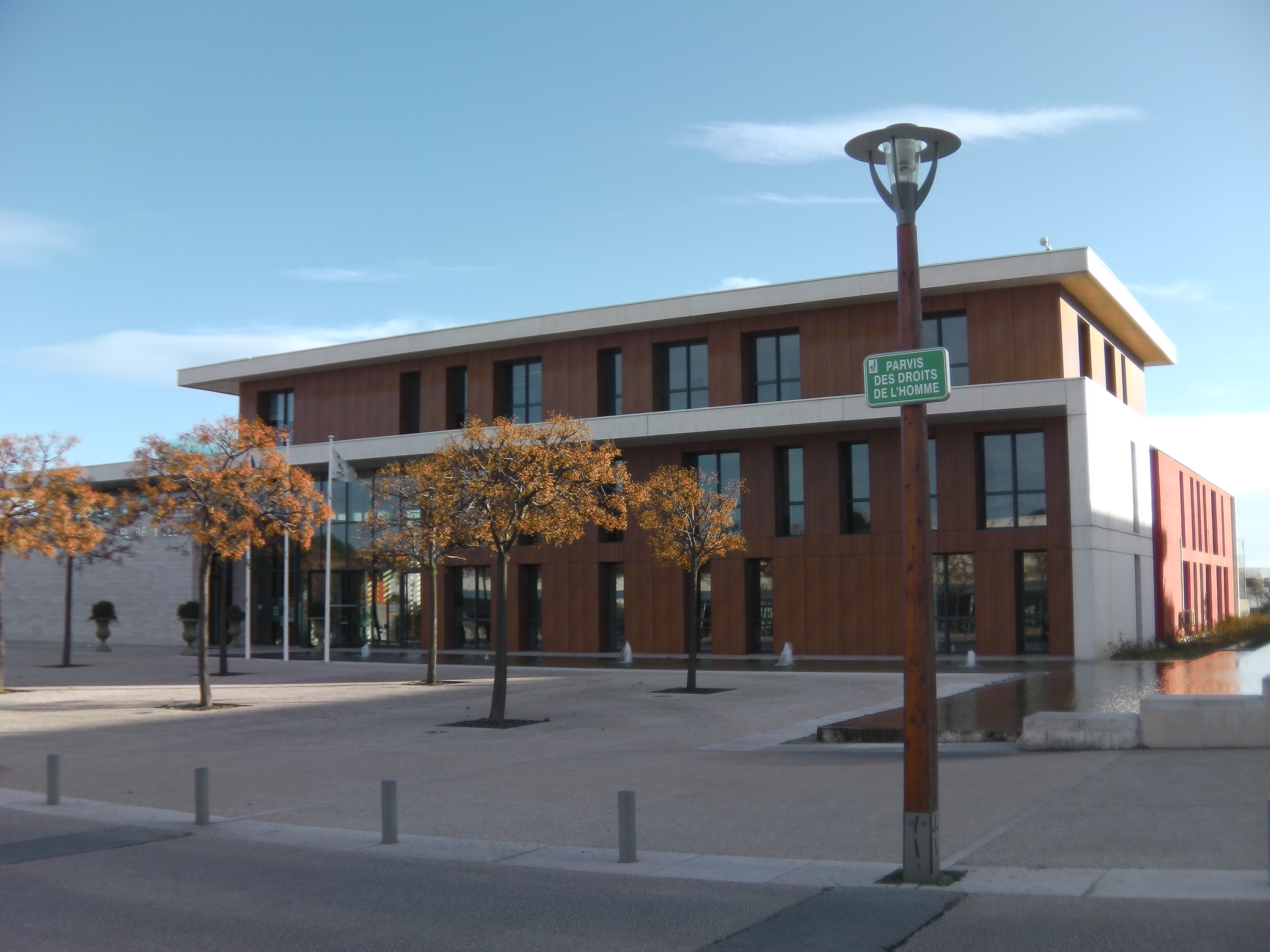 Hôtel de ville de Juvignac (Hérault)